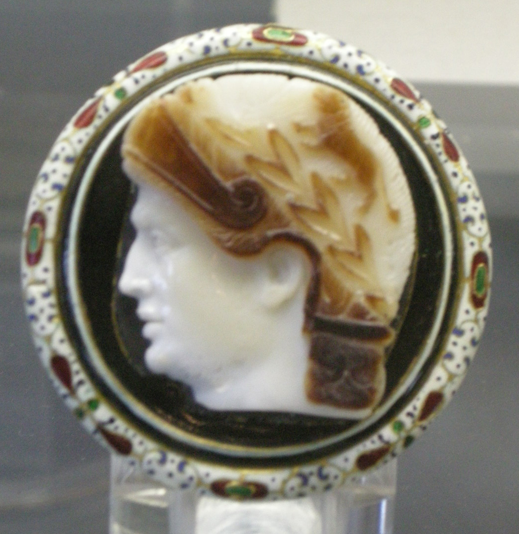 CdM, marcantonio raffigurato come alessandro, sardonice, 40 ac. circa